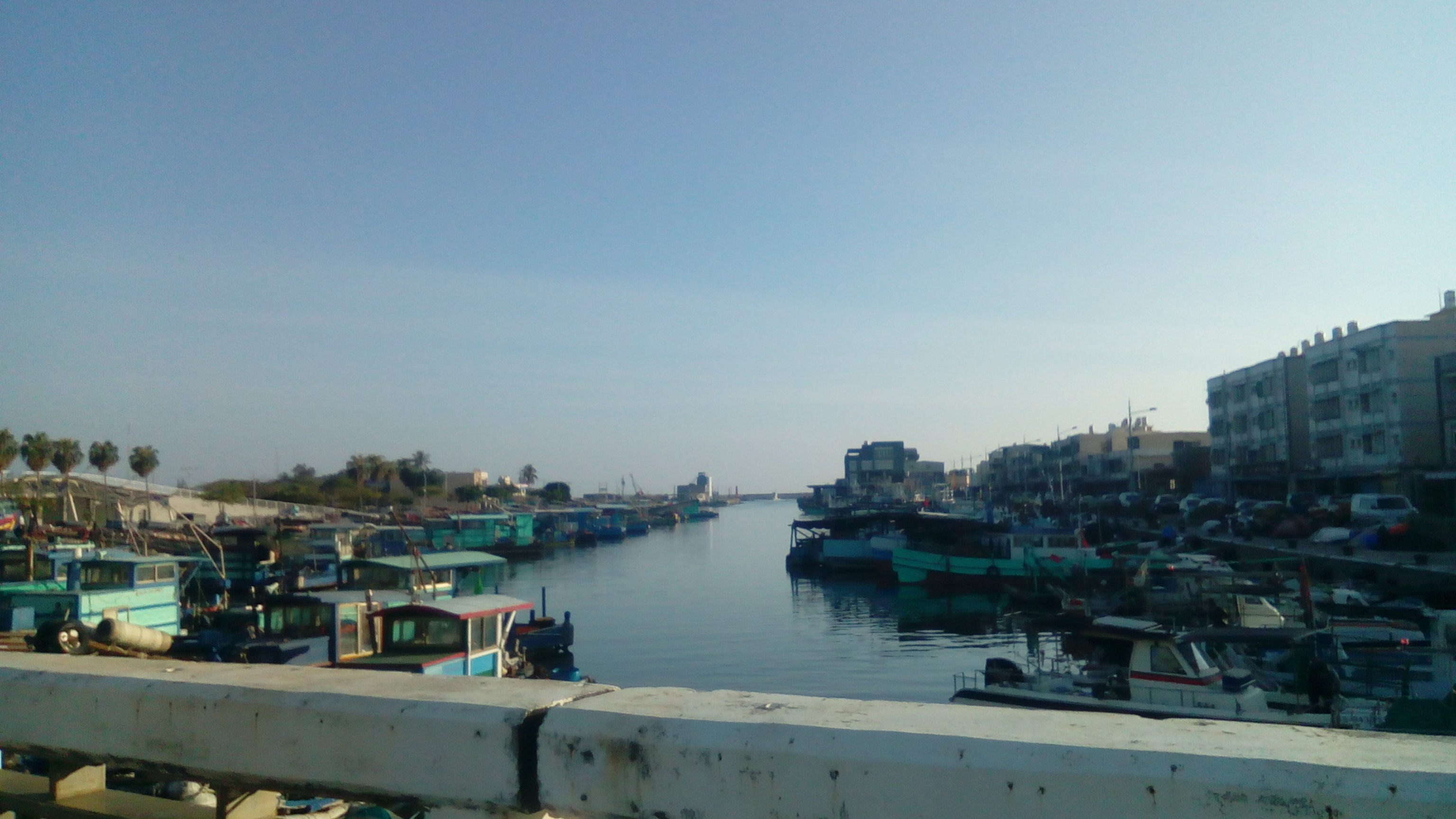 同上 位於林園南部的中芸市區